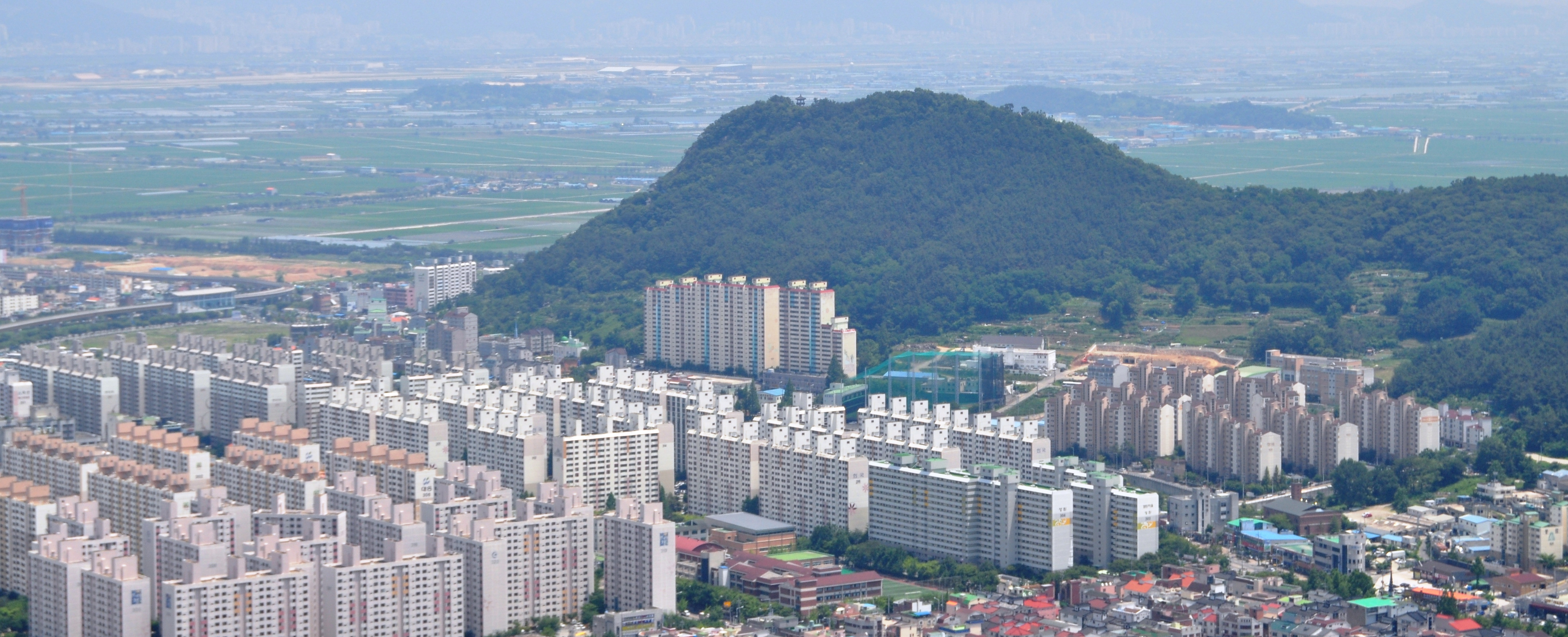 임호산 (김해시 내외동, 칠산서부동)